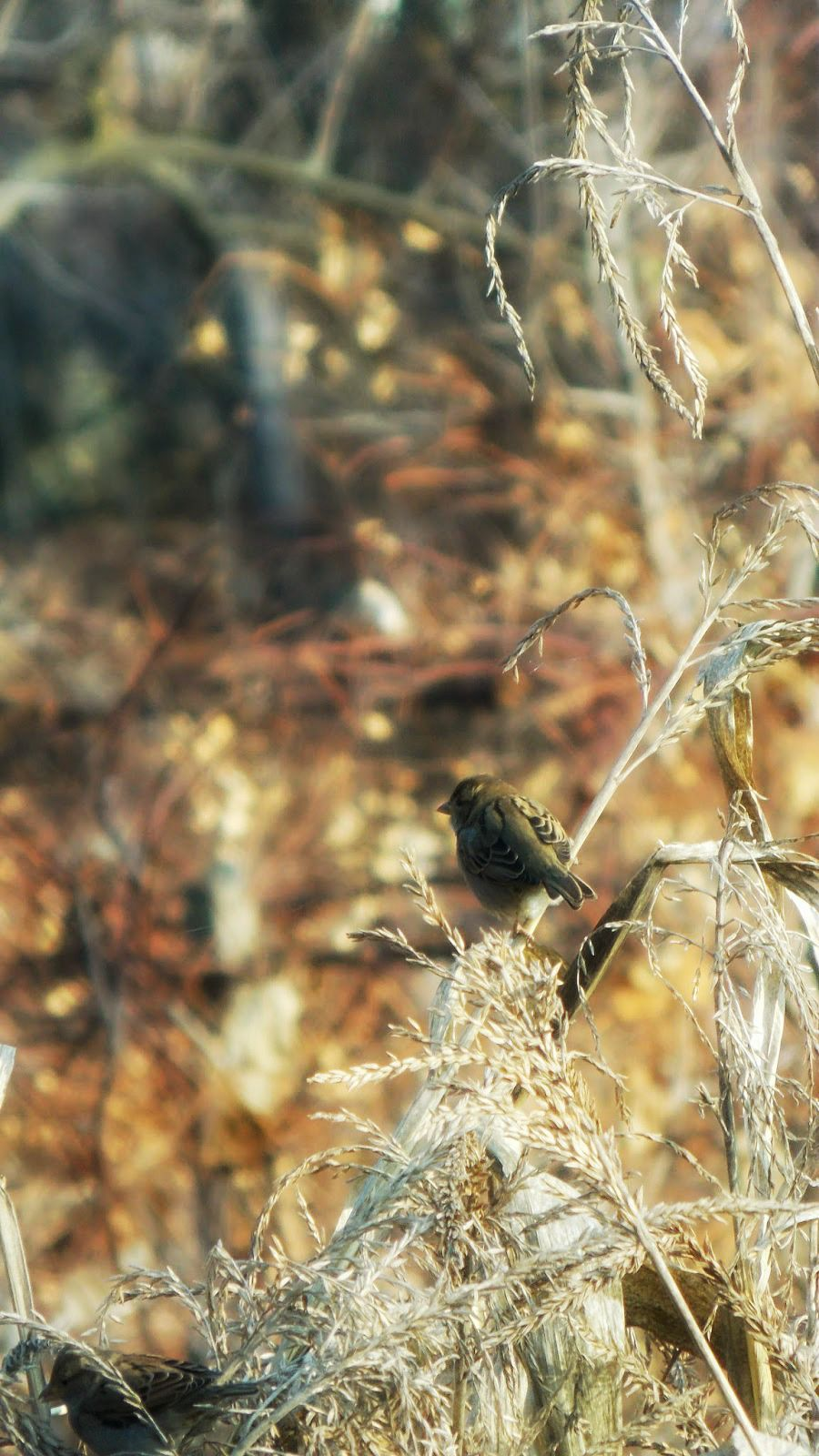 O vrabie